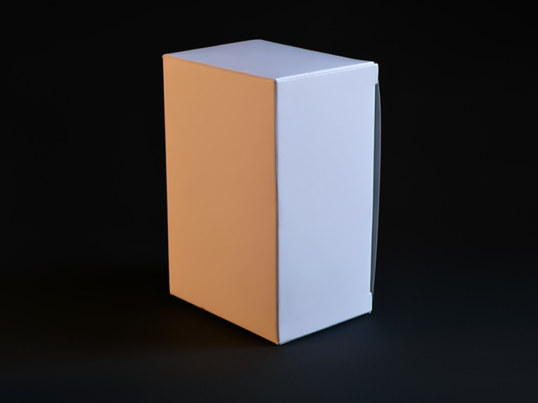 boîte en carton blanc éclairée par des lumières de température de couleur différente ; à gauche, incandescence 2740K 890 lx, à droite jour indirect 7040K 830 lx, mesure Gossen colormaster 3F, photo Panasonic DMC-LX2